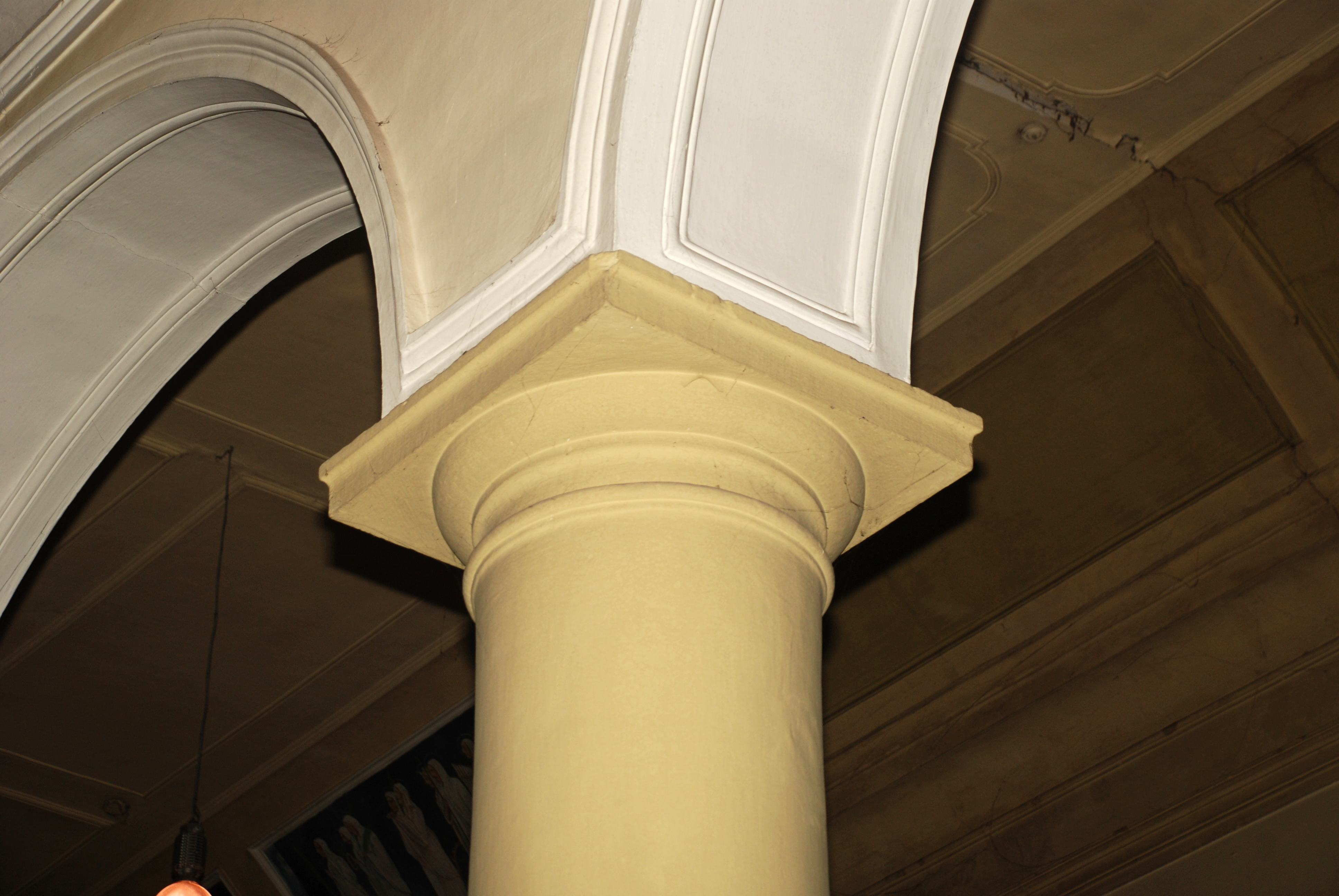 Belgique - Brabant wallon - Église Saint-Martin de Ways